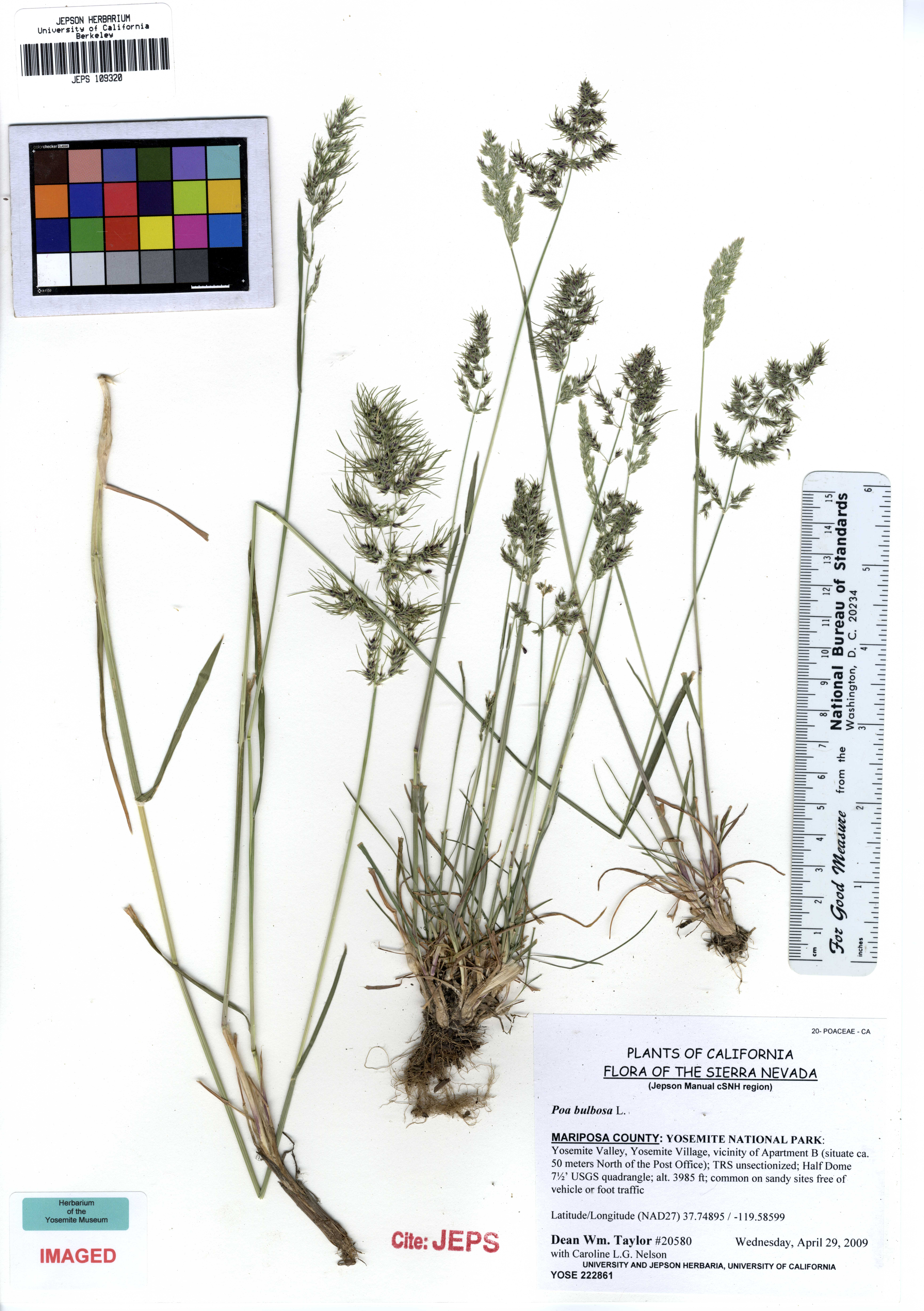 JEPS109320 Poa bulbosa